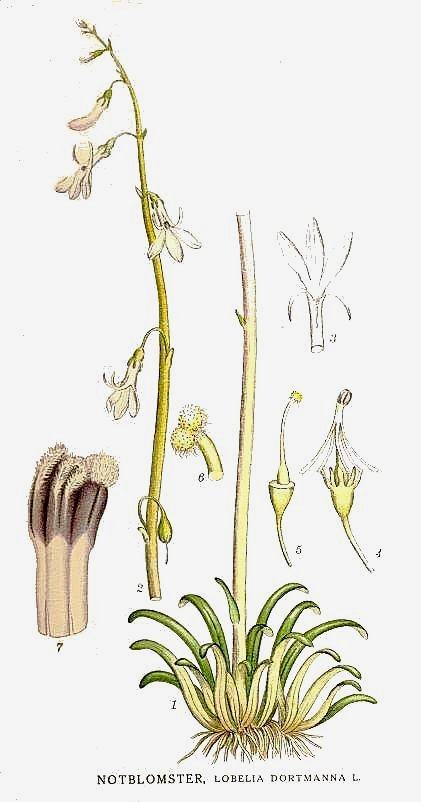 Original Description Notblomster, Lobelia dortmanna L.